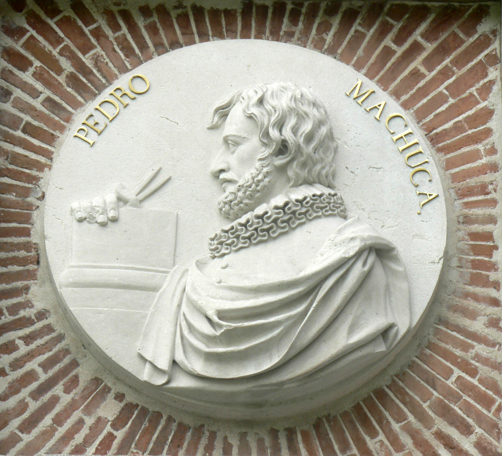 El pintor y arquitecto español Pedro Machuca (Toledo, 1490 – 1550). Medallón incrustado en la fachada del Museo del Prado, Madrid.